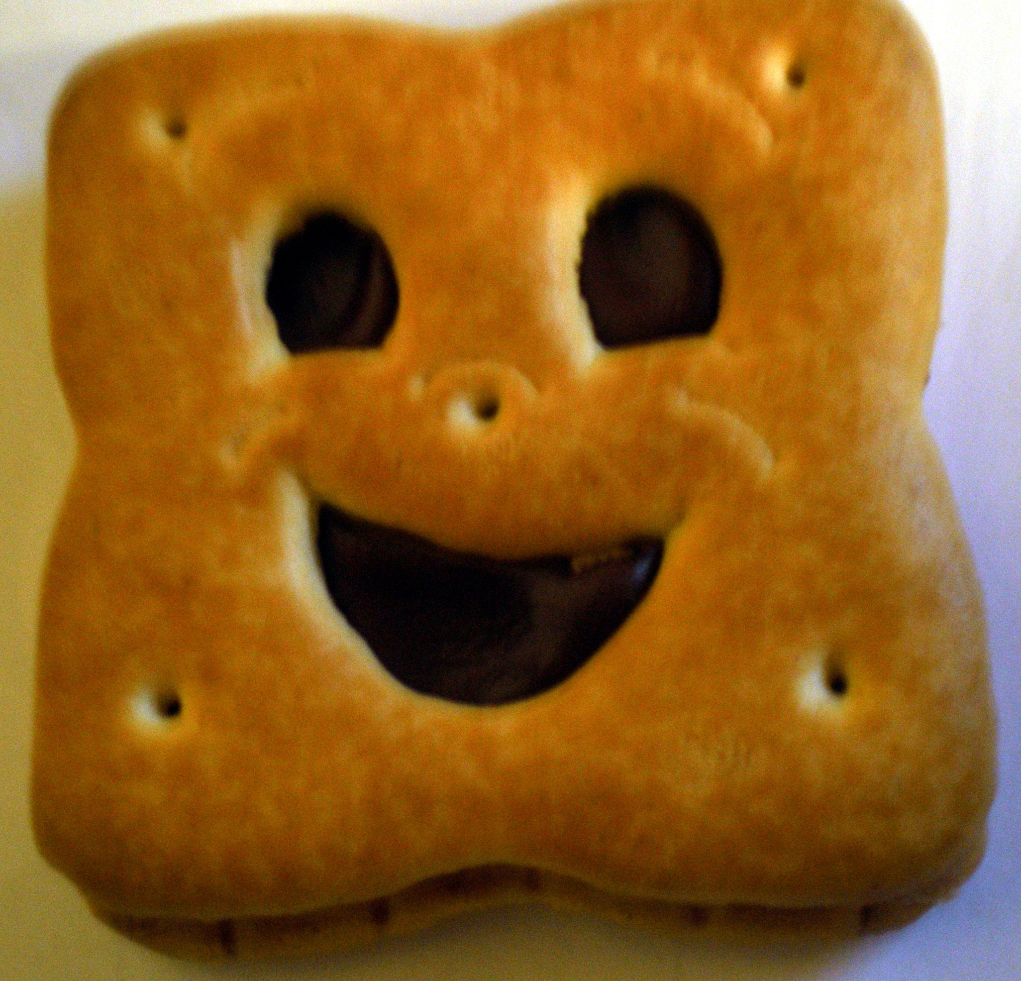 aurelie